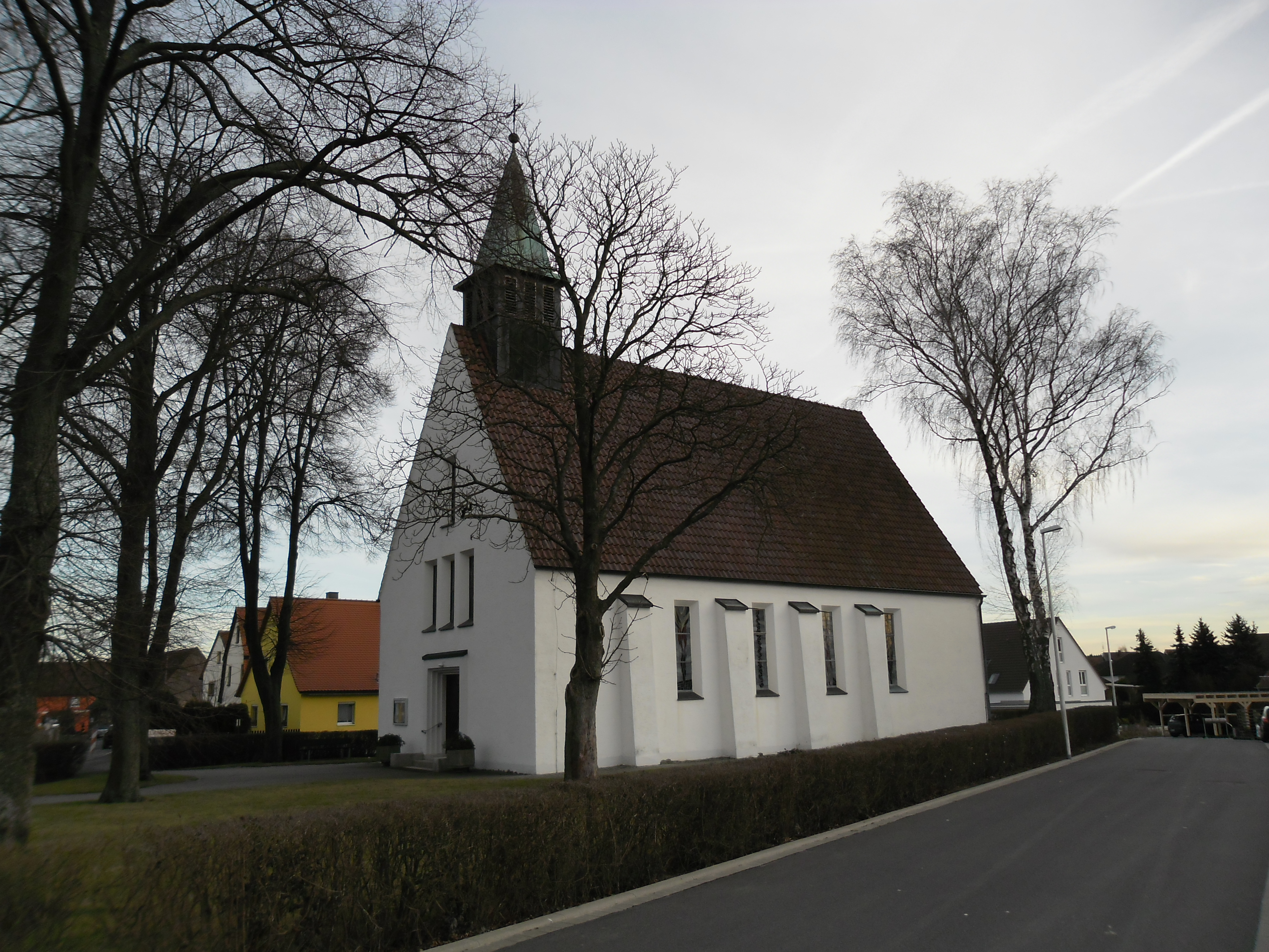 Die St.-Marien-Kirche an der Ecke Haundorfer Straße/An der Kirche in Herzogenaurach-Haundorf